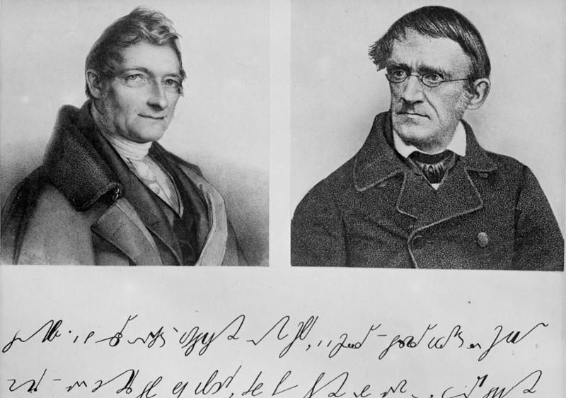 Zur grossen Tagung der deutschen Stenographen in Berlin ! Die Altmeister der deutschen Kurzschrift Franz Xaver - Gabelsberger (links) und Wilhelm Stolze (rechts), welche die Grundlagen der modernen deutschen Kurzschrift gelegt haben.